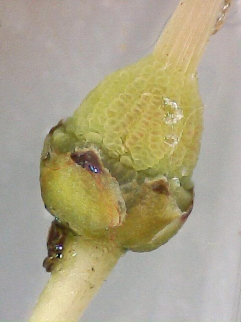 Arbutus unedo (Madroño) - Detalle del ovario tuberculado con el estilo surcado; hay restos del cáliz. (se ha quitado la corola) - Calle Goya, cultivado/ornamental (Madrid, España)